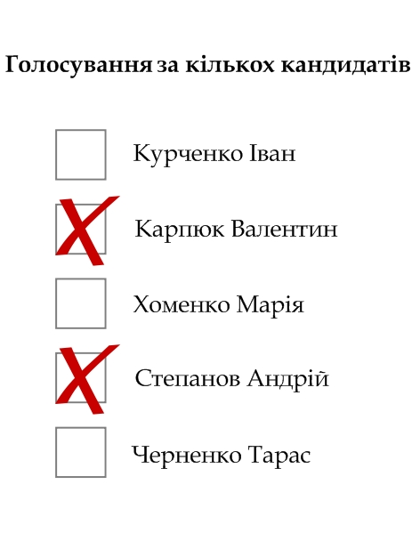 Виборча система